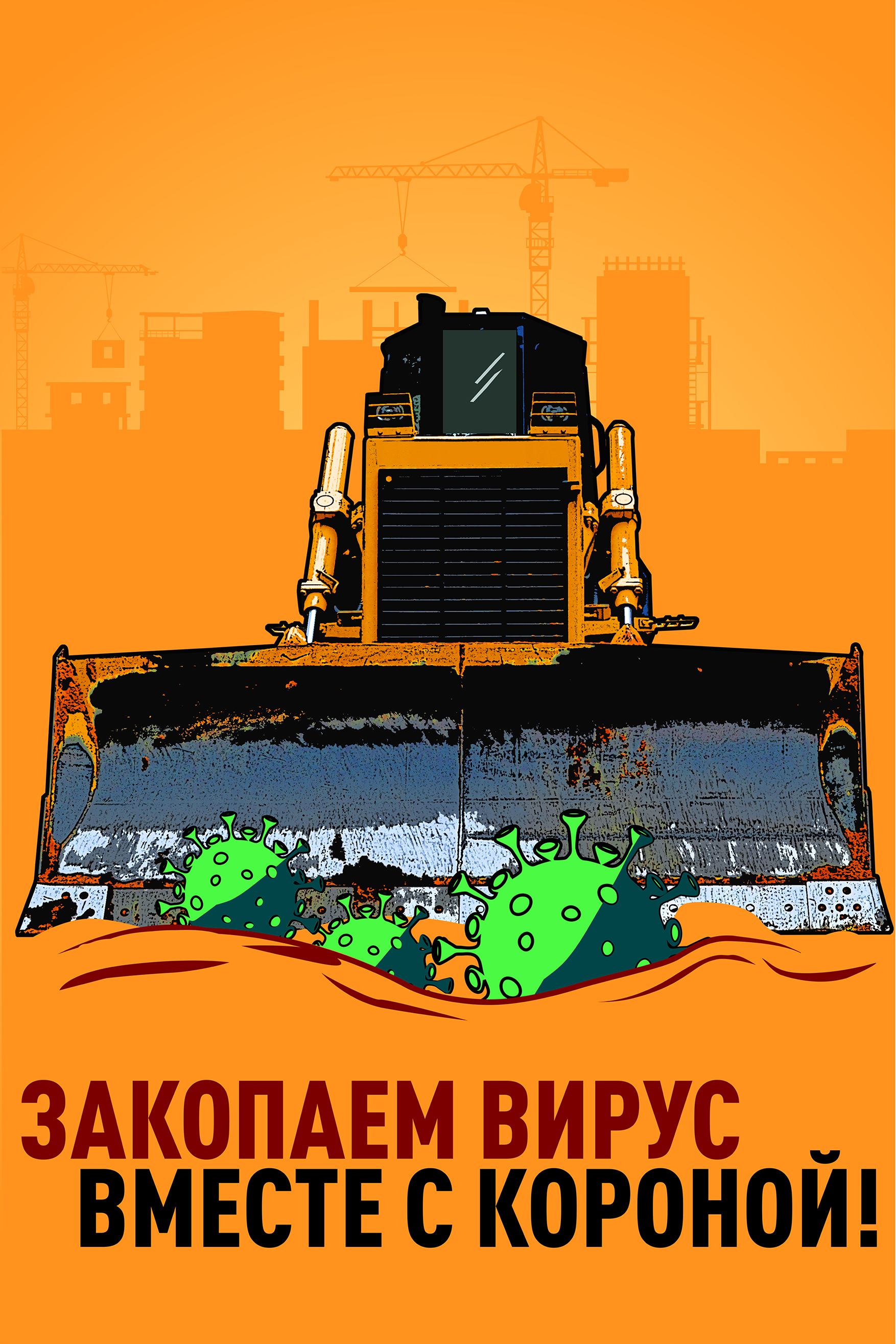 "закопаем вирус вместе с короной!" Плакат с изображением бульдозера из серии плакатов, размещенных на строительной площадке инфекционного центра в Новой Москве, и мотивирующий рабочих во время пандемии короновируса COVID-19